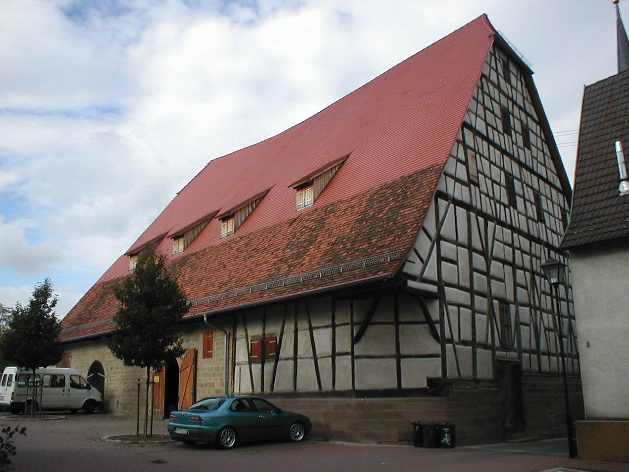 Gemmingensche Kelter in Kleingartach